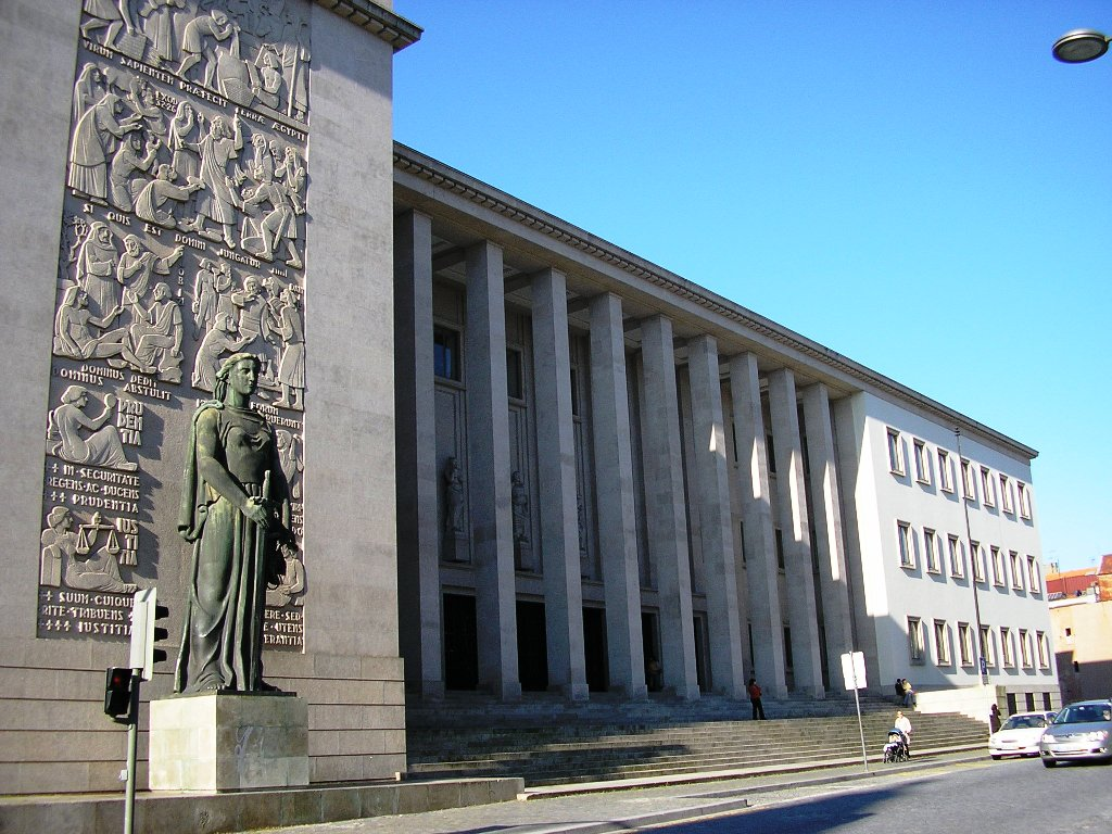 "Palácio da Justiça", main courthouse in Porto, Portugal.